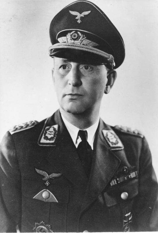 Generalleutnant Kreipe, Chef des Generalstabes der Luftwaffe Scherl-Bilderdienst 2.8.1944